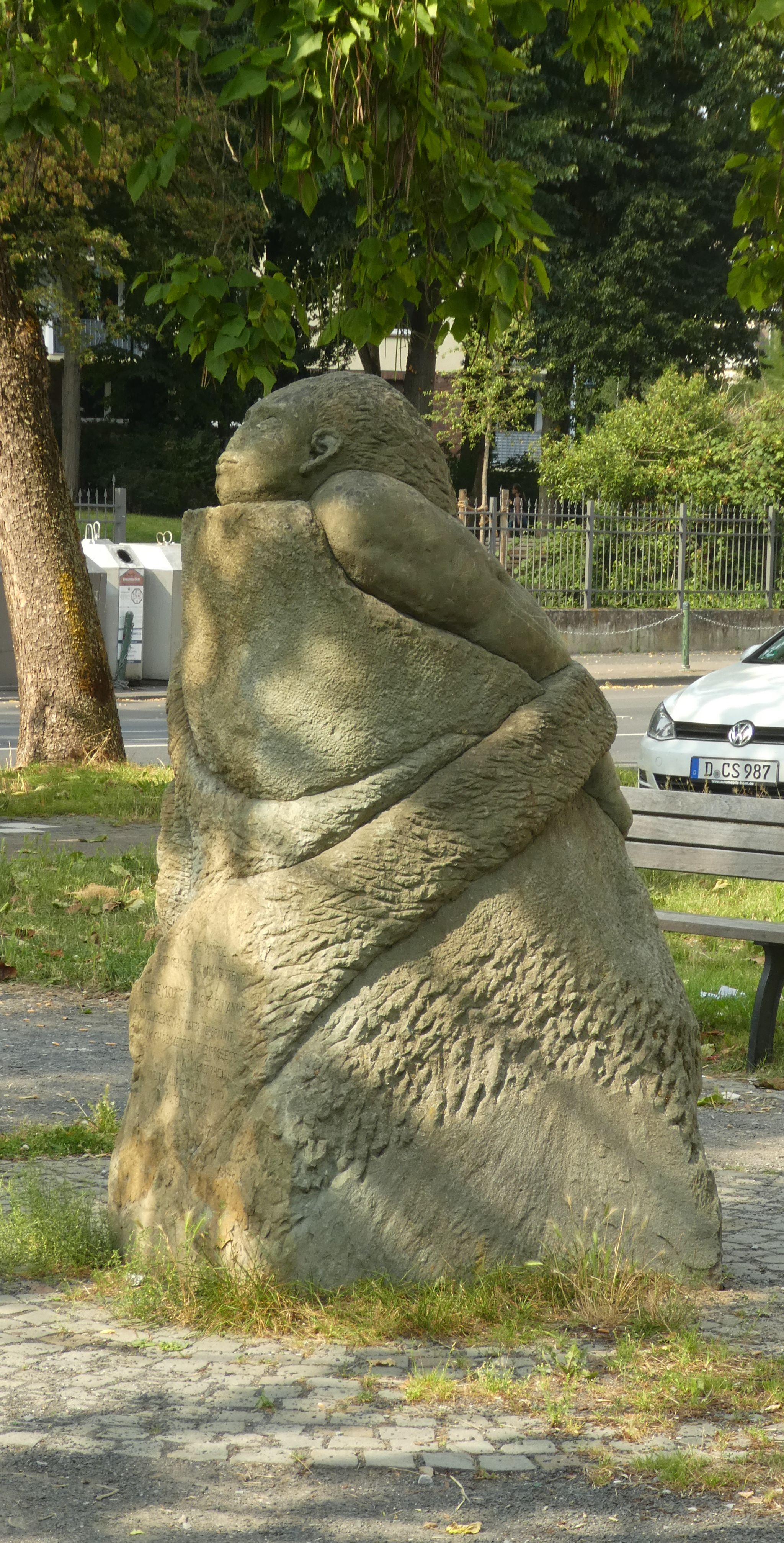 Gerresheimer Hexenstein in Düsseldorf - Denkmal am Orte einer Hexenverbrennung